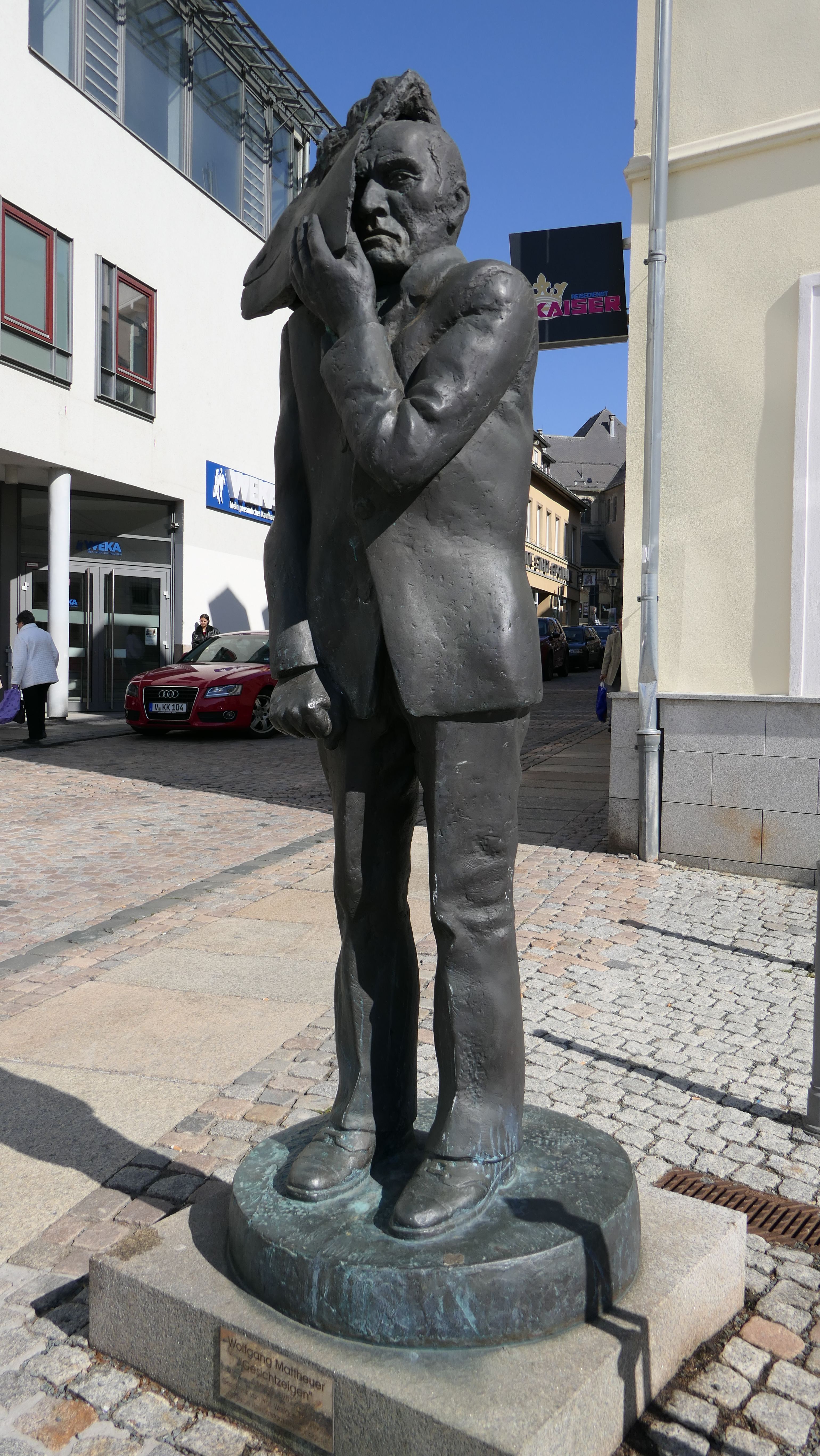 Bronze-Statue "Gesicht zeigen" von Wolfgang Mattheuer auf dem Markt in Reichenbach im Vogtland